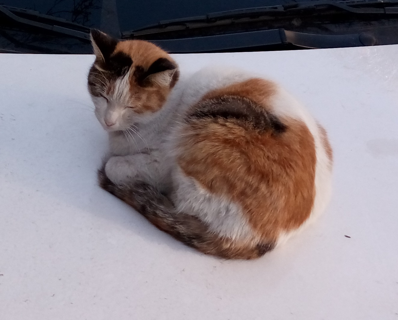 گربه ایرانی